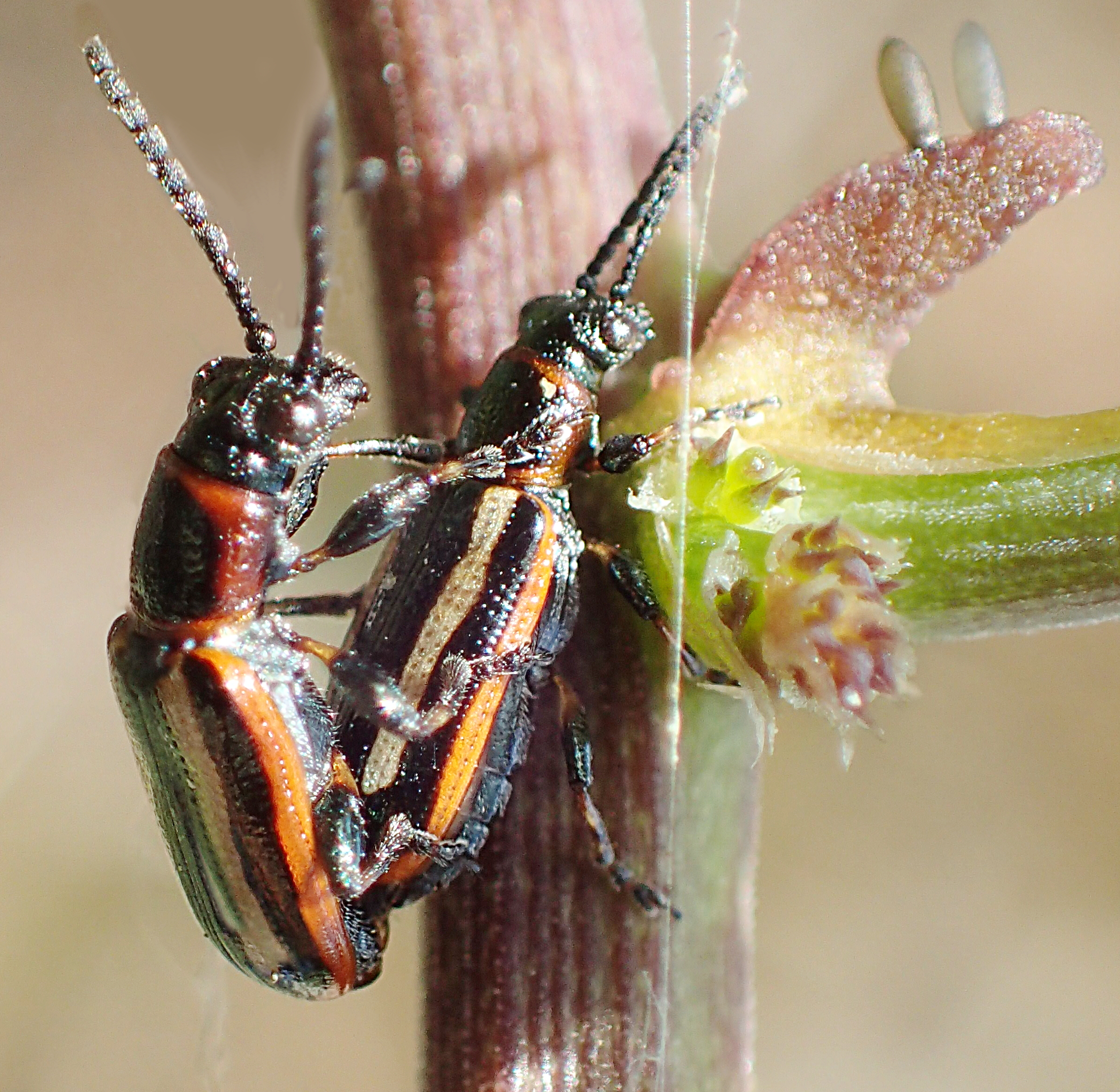 Crioceris macilenta von Griechenland, Peloponnes, Olympia